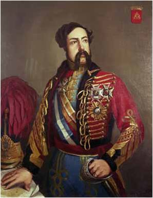 Retrato del teniente general Diego de León, conde de Belascoain (1807-1841). Destacó por su valor en la Primera Guerra Carlista y fue fusilado en 1841 por haber asaltado el Palacio Real de Madrid e intentar secuestrar a la reina Isabel II de España..